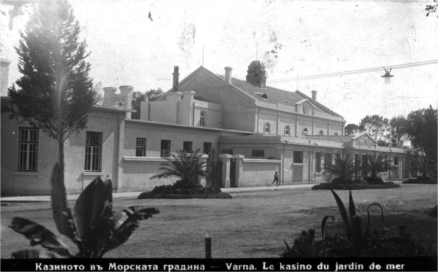 Облика на Морско казино от 1926г.